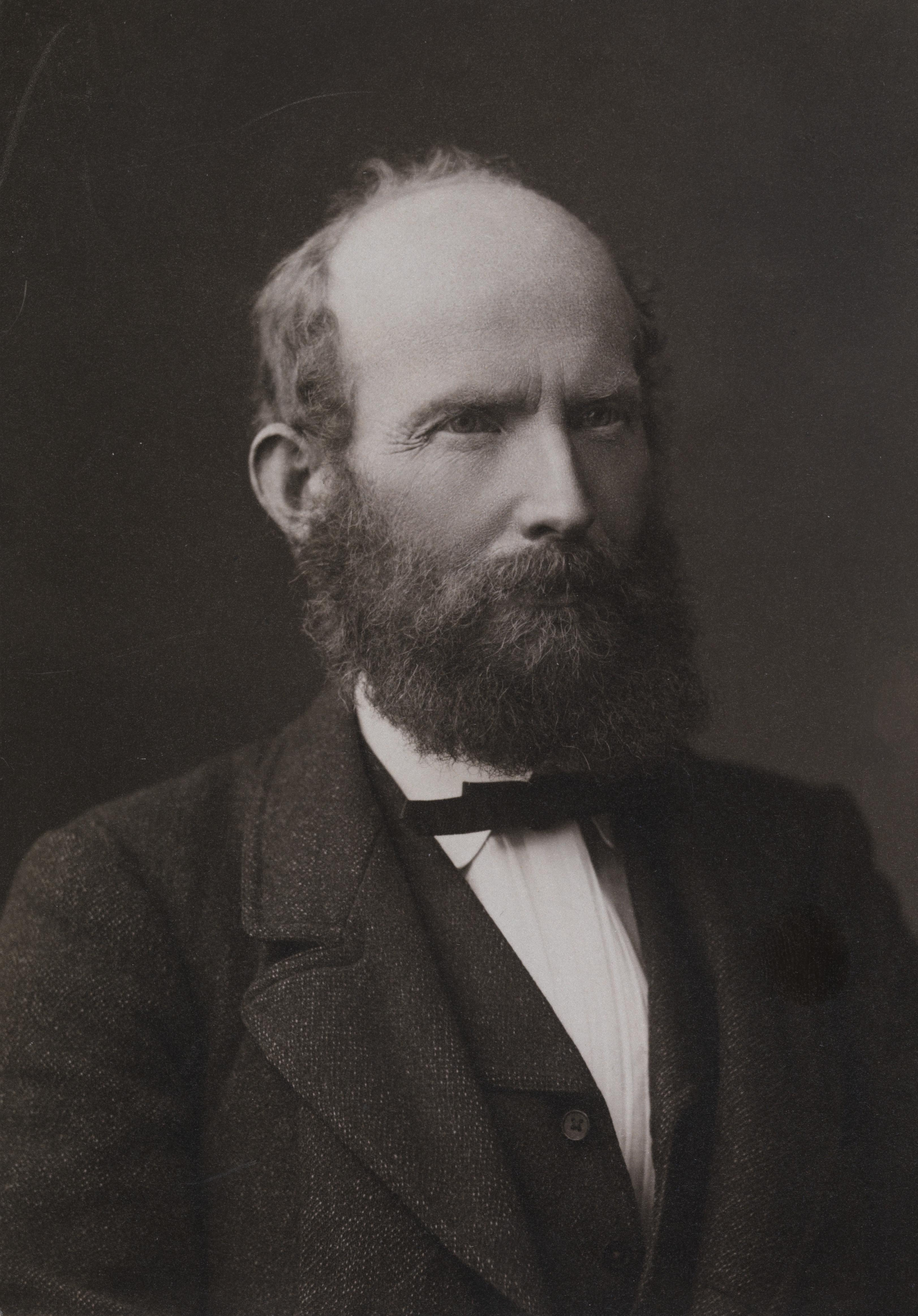 Peter Olrog Schjøtt (1833 – 1926), norsk filolog, professor og politiker (V)